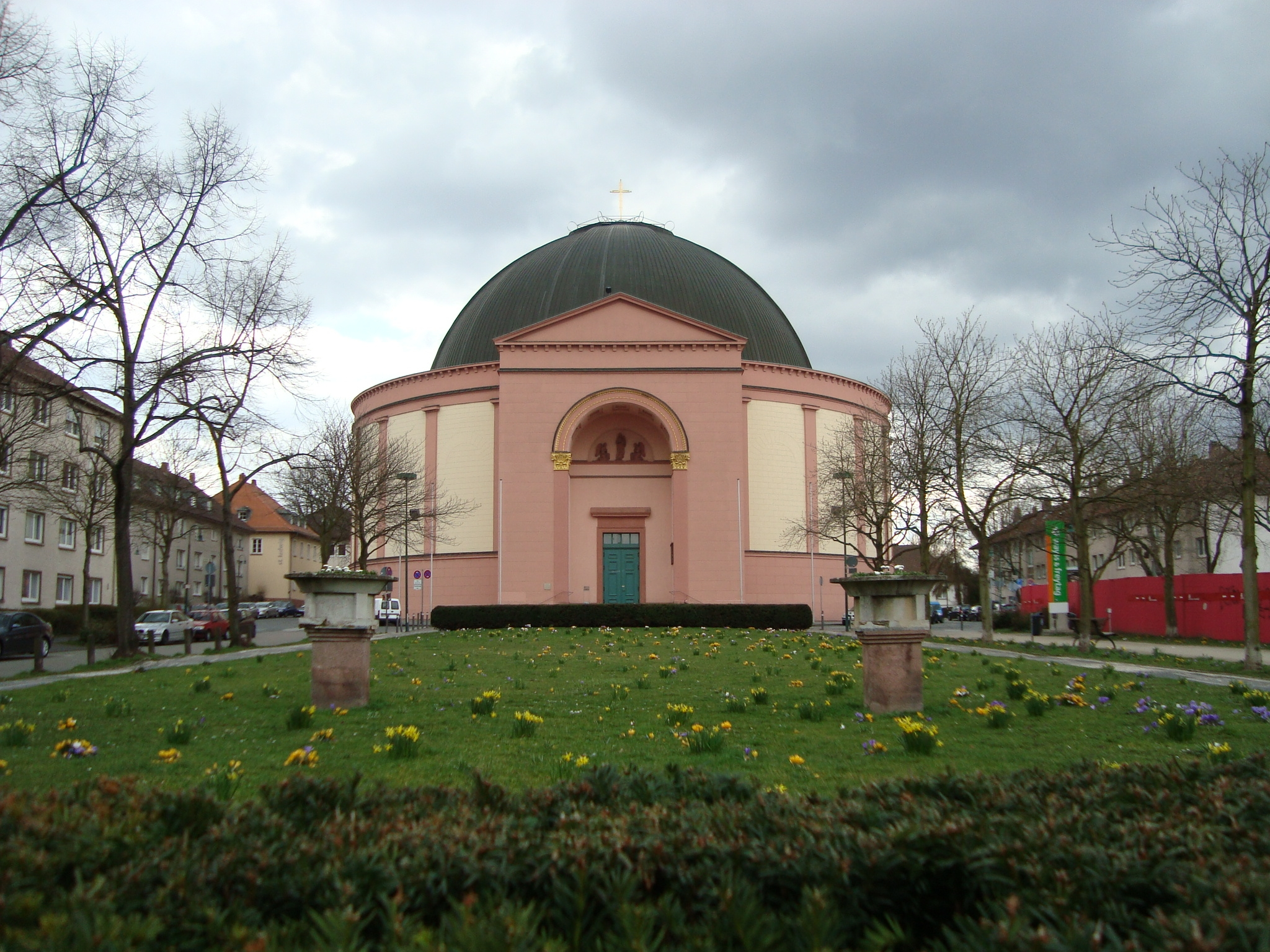 Die St.Ludwig katholieke Kerk naby Luisenplatz. Gebou tussen 1822 en 1827 deur Georg Moller.